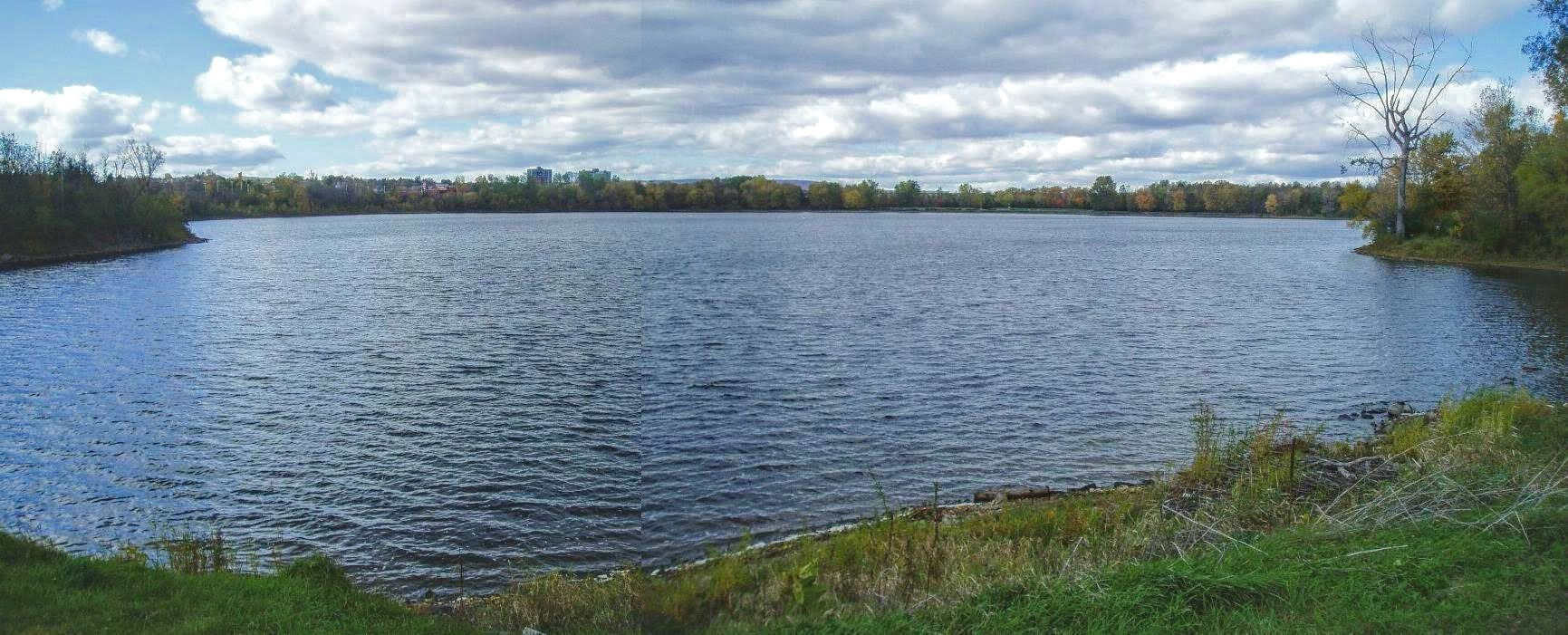 Lac Leamy